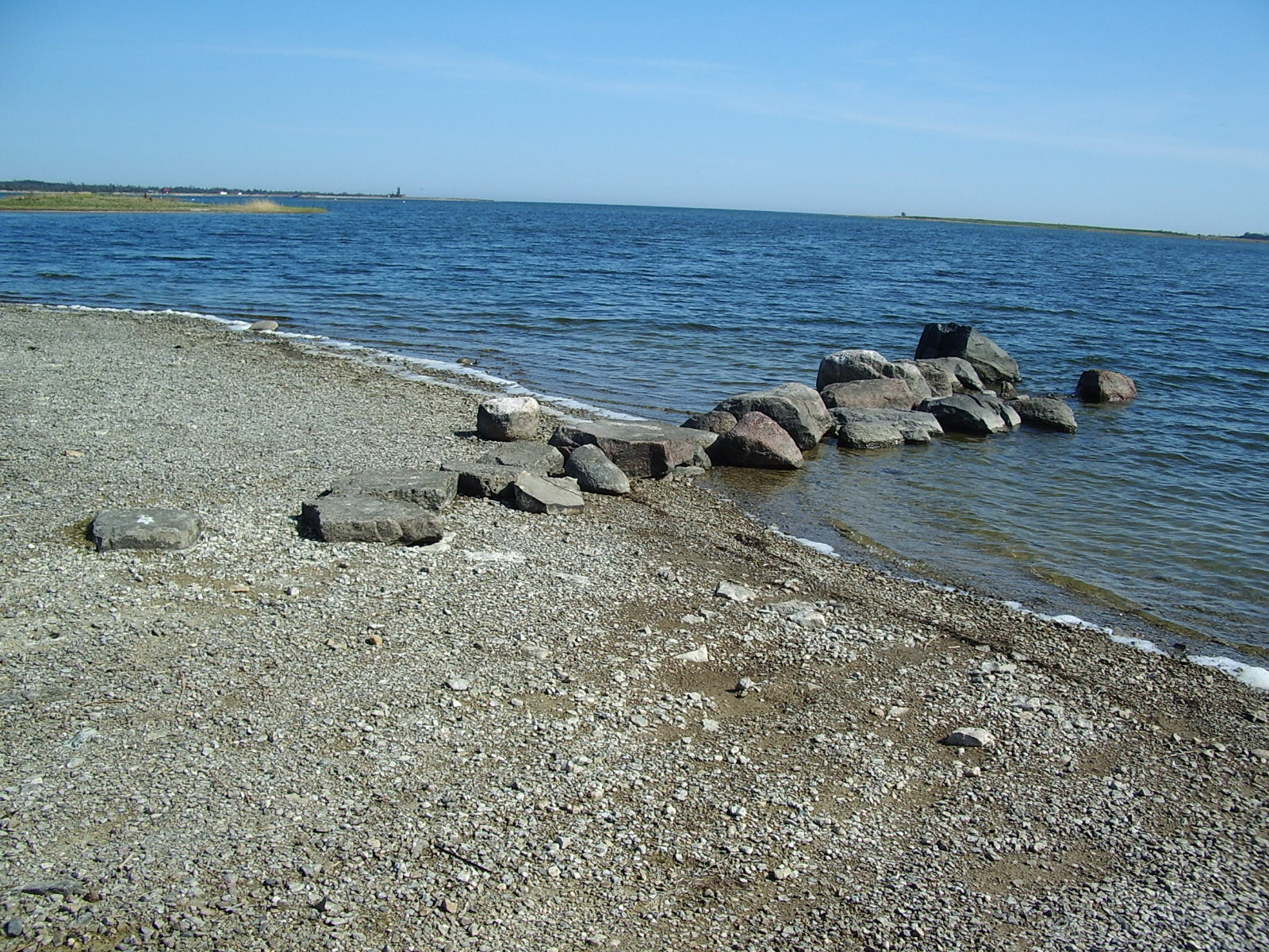 Vaade Kõiguste lahele